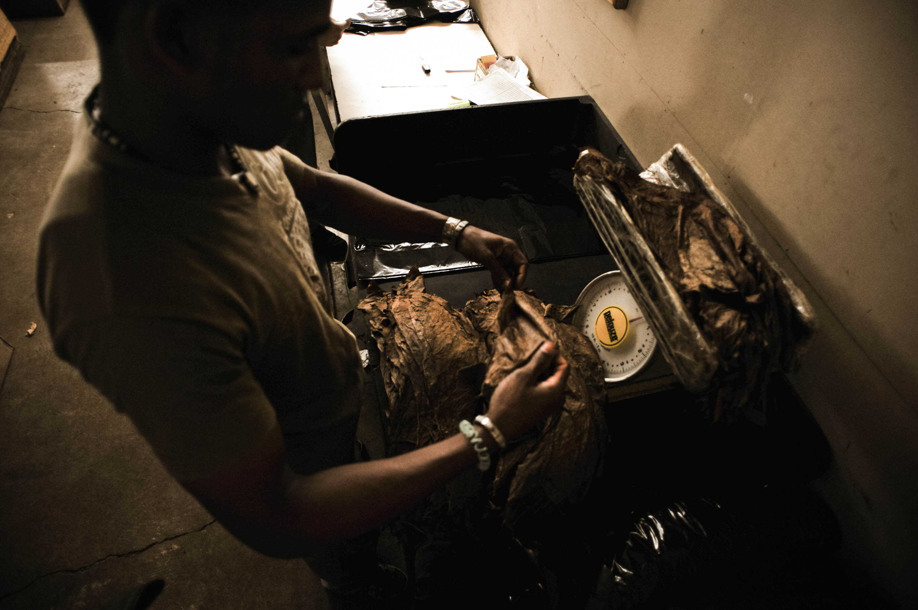 Keywords:Caribbean; Casa Del Campo; Cigar factory; Dominican Republic; La Romana; Домениканская республика; Карибские острова; Ла Романа; Фабрика Сигар Handmade cigar production. Manufacture worker. Tabacalera de Garcia Factory. Casa de Campo, La Romana, Dominican Republic.